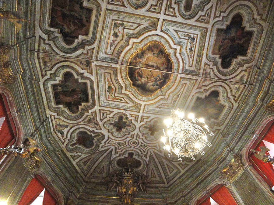 Igreja Matriz de Nossa Senhora do Pilar - Ouro Preto